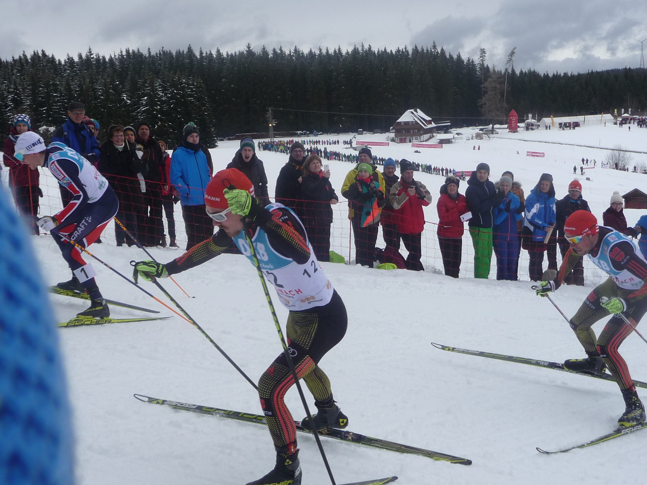 Weltcup Nordische Kombination 5. März 2016 in Schonach: Nr. 1 Havaard Klemetsen (NOR), Nr. 12 Fabian Rießle (GER), (Nr. 13) Johannes Rydzek (GER)